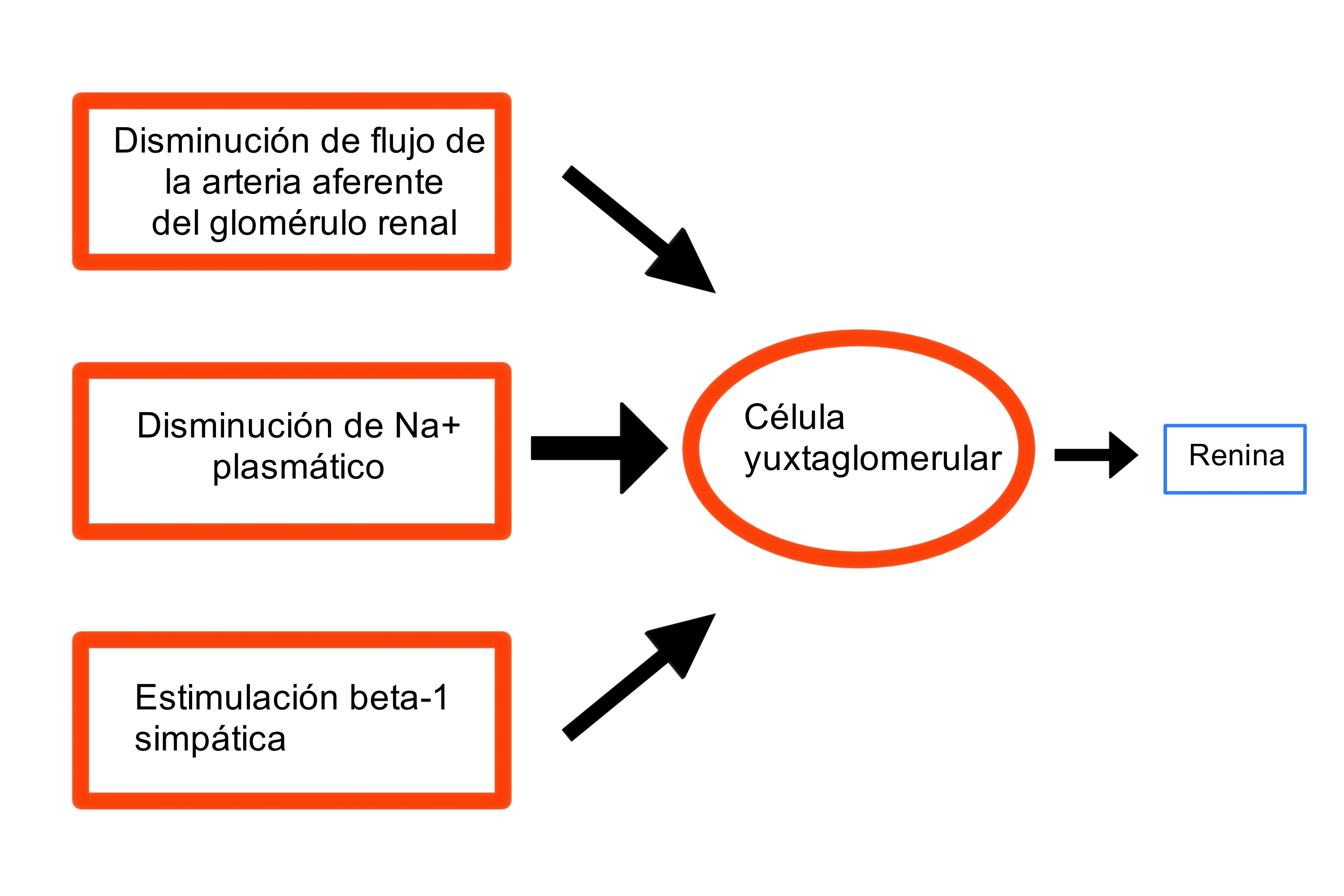 Diagrama en el que se indican los principales factores que estimulan la producción de renina por las células yuxtaglomerulares del riñón